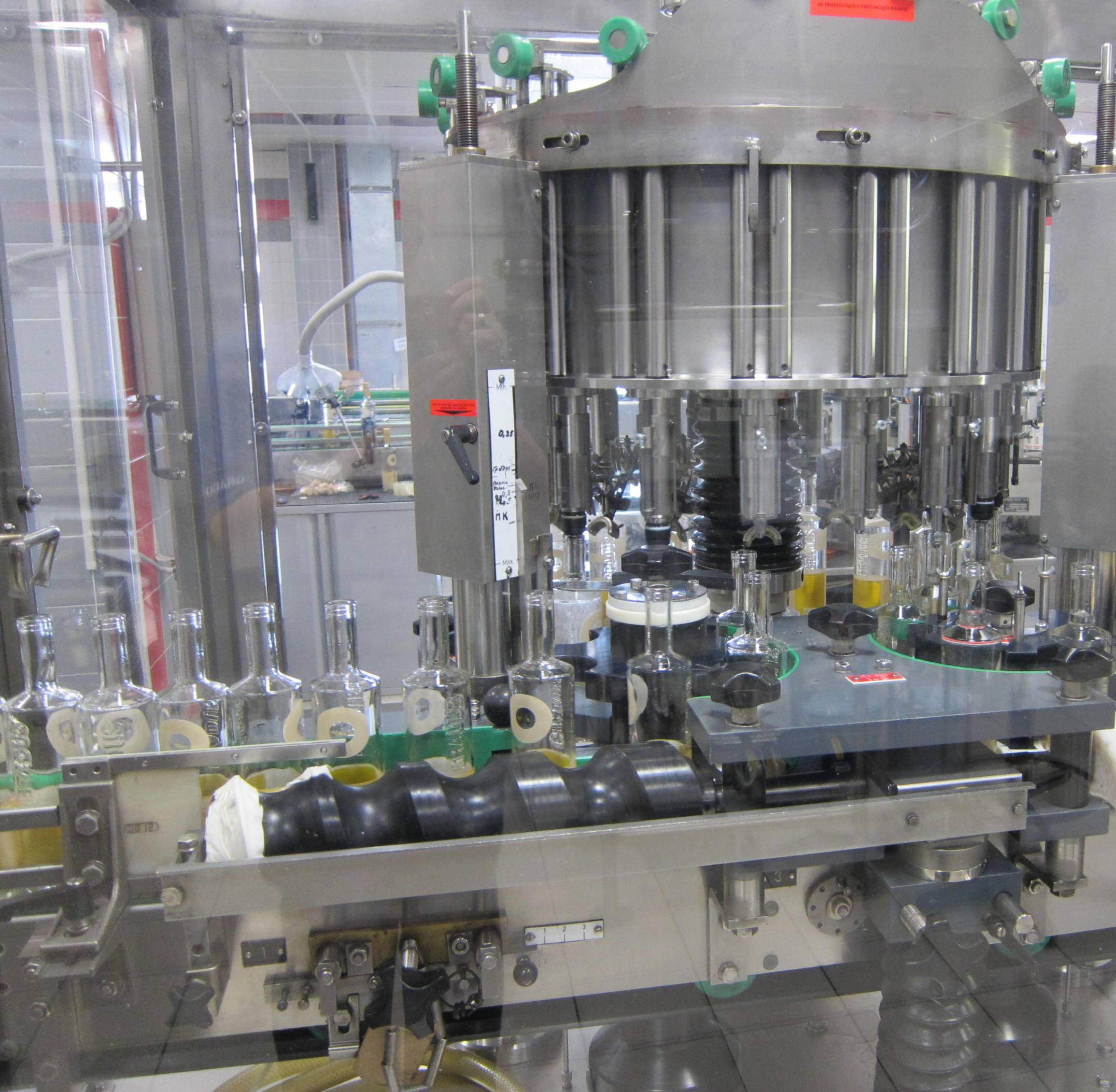 Водочный цех. Розливо-укупорочное оборудование "Пермалко"